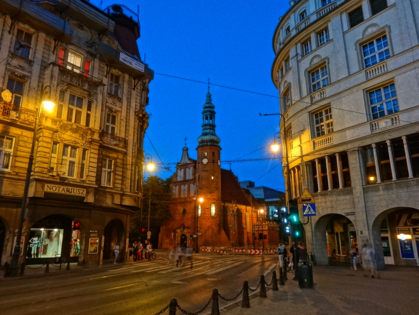 Kościół p.w. Wniebowzięcia Najświętszej Marii Panny w Bydgoszczy (zbud. 1582-1615, do 1835 r. kościół klasztorny klarysek bydgoskich)